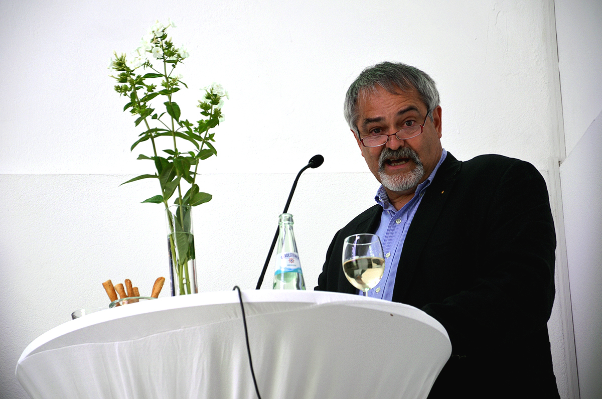 In der Reihe Stufen zur Kunst der Stiftung Niedersachsen und des Kunstvereins Hannover wurde am 15. August 2013 im Treppenaufgang vom Künstlerhaus der niedersächsischen Landeshauptstadt das neue Projekt Second Nature eröffnet: Die Lichtinstallation der Künstler Heike Mutter und Ulrich Genth ist seitdem bis zum 31. Juli 2014 zu sehen. Zur Eröffnung sprach vor rund 100 Gästen, die der Einladung gefolgt sind, zunächst der Generalsekretär der Stiftung Niedersachsen, Joachim Werren ...